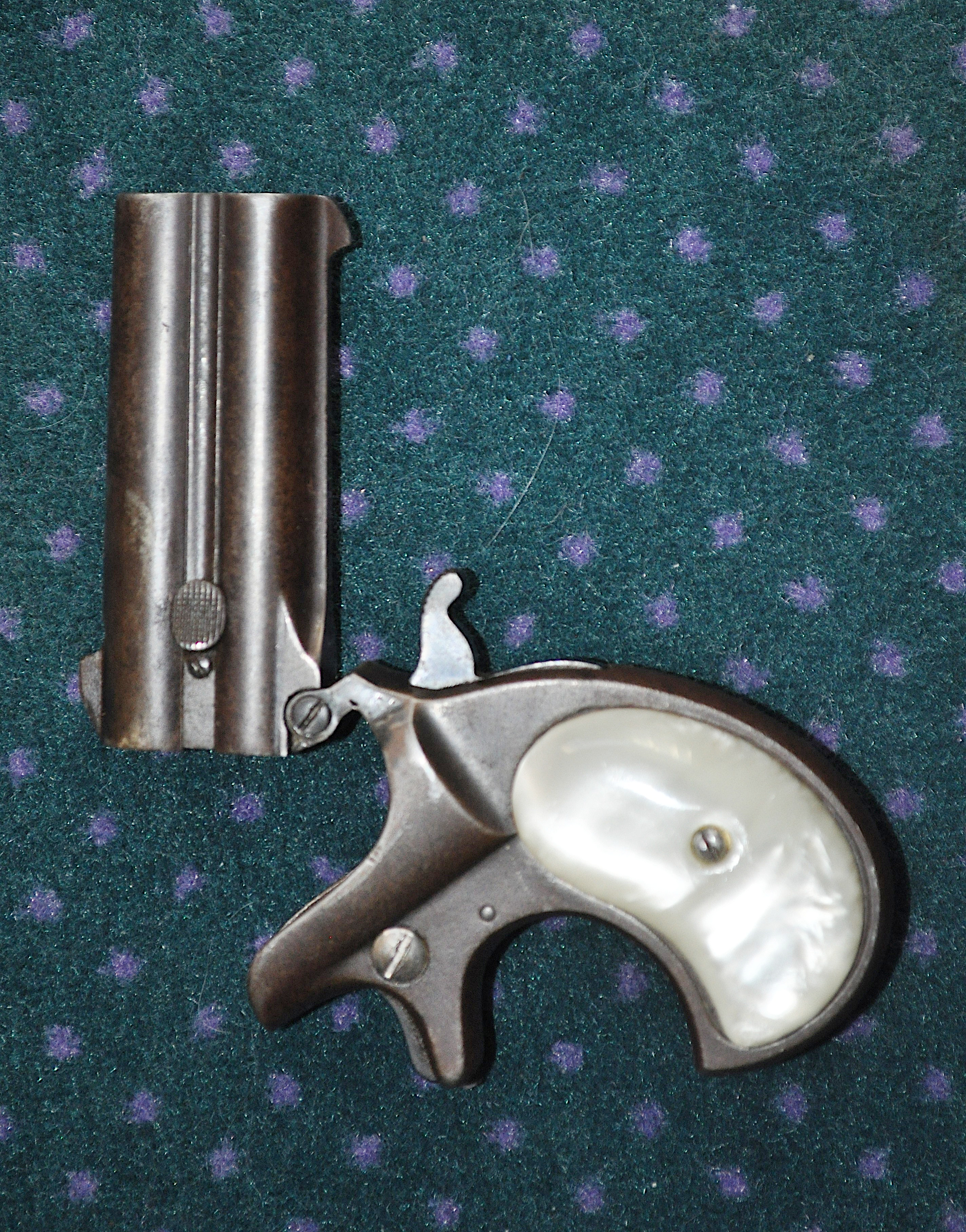 Geopende Remington Derringer 4de model